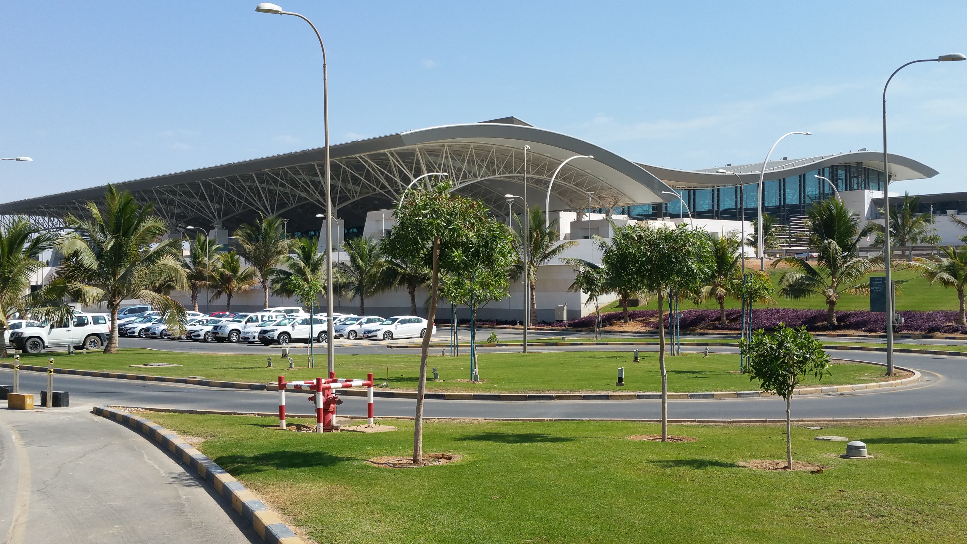 Das neu gebaute Terminal des Salalah Airports.